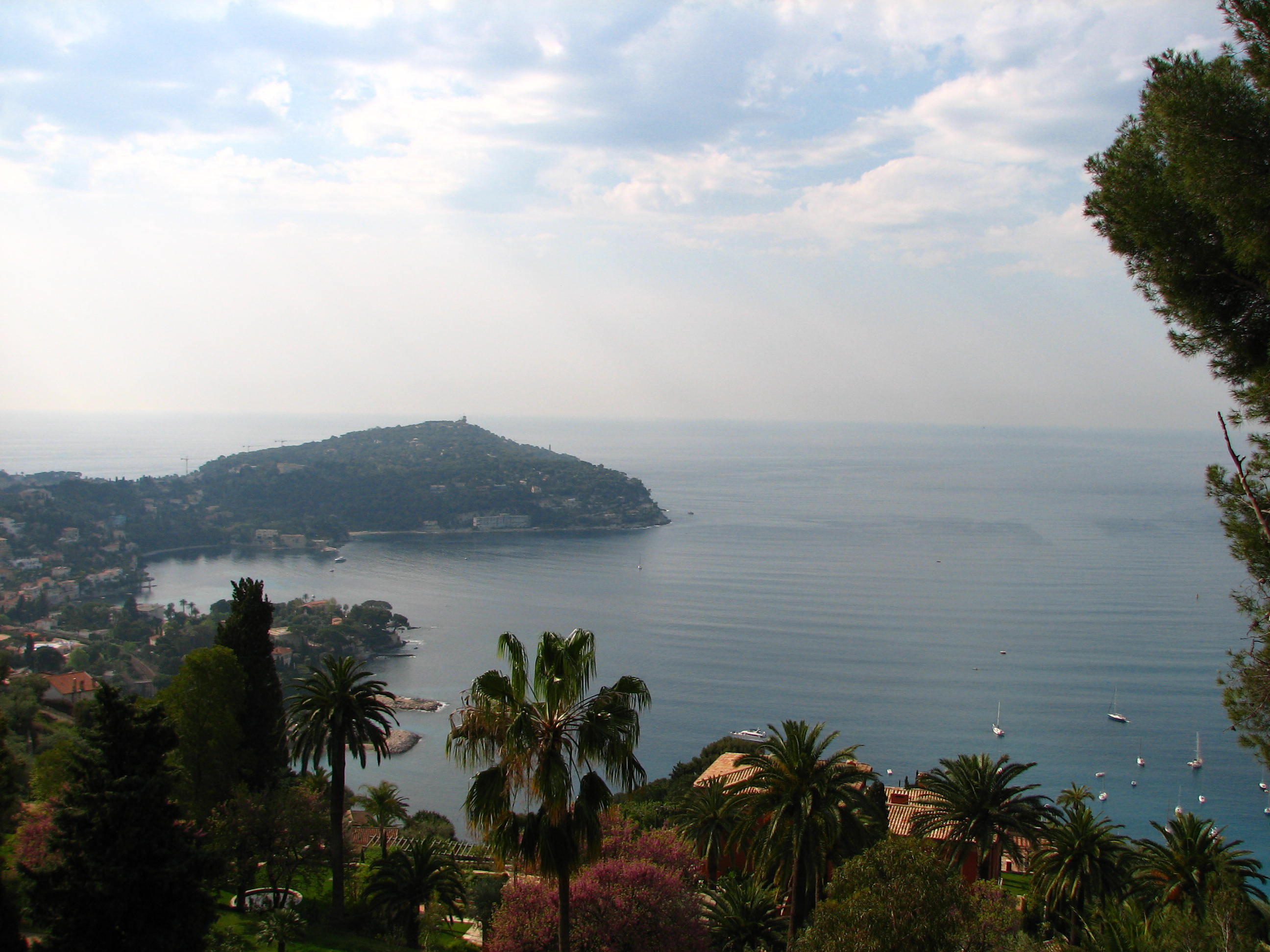 Cap Ferrat